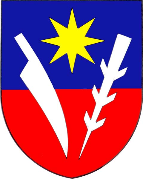 Česky: znak obce Lužice